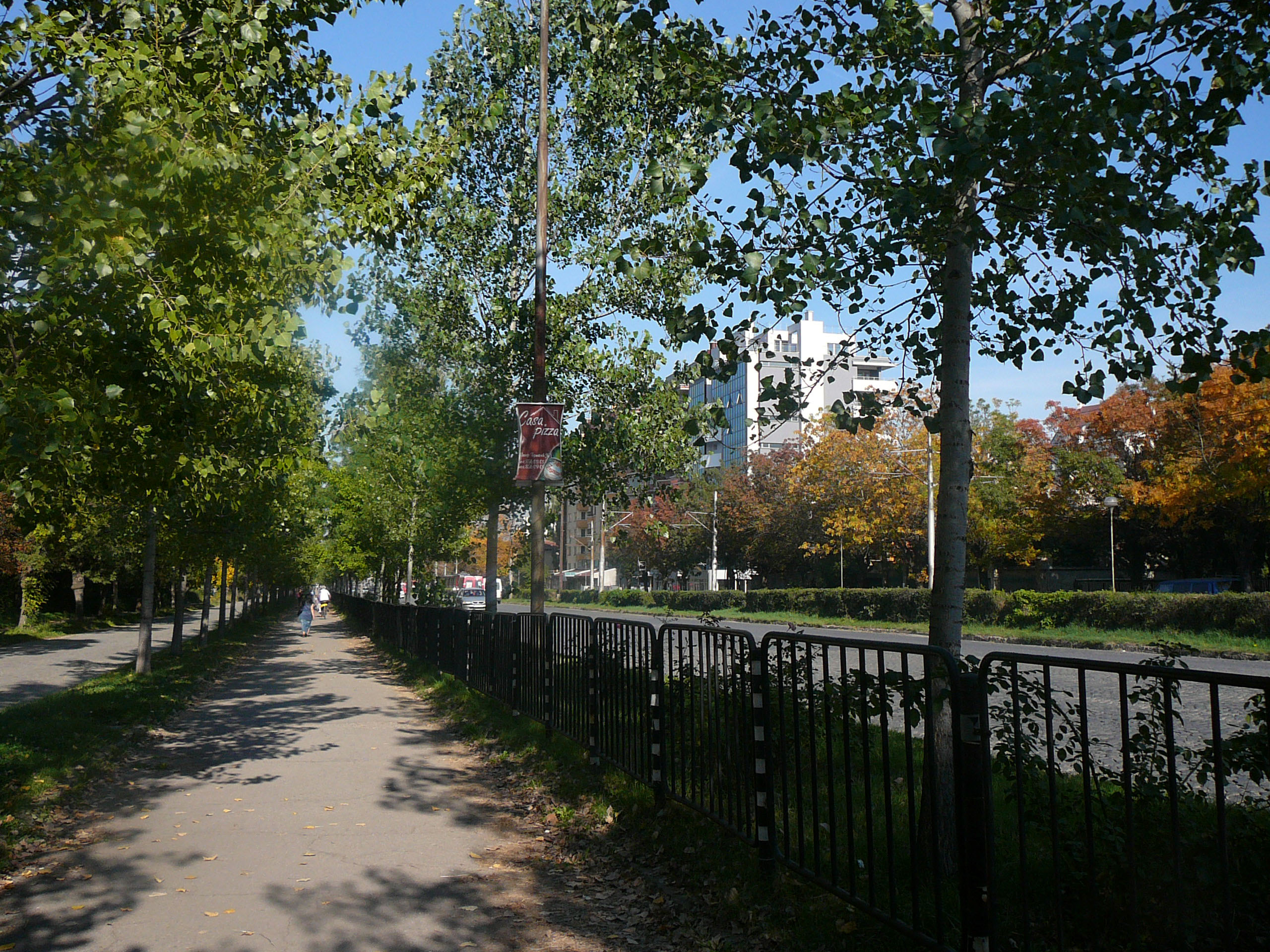 Template:Картинка инфо